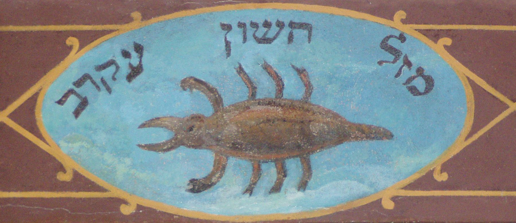 Znaki zodiaku na belkowaniu galerii dla kobiet synagogi Kupa w Krakowie